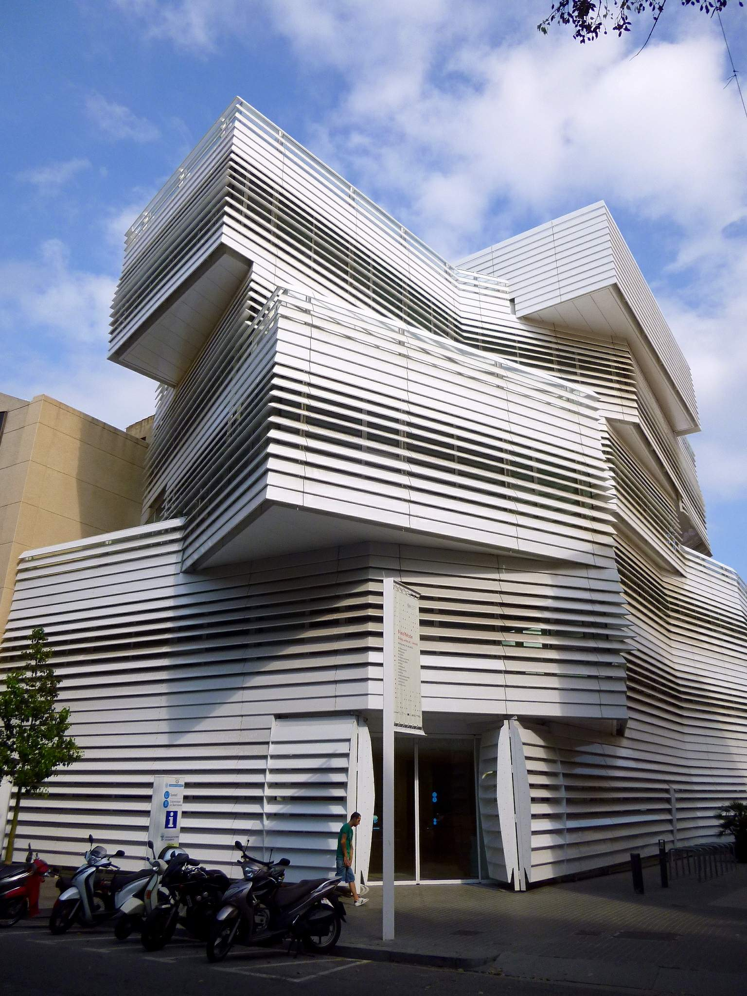 Centro Cultural El Carme (Badalona)